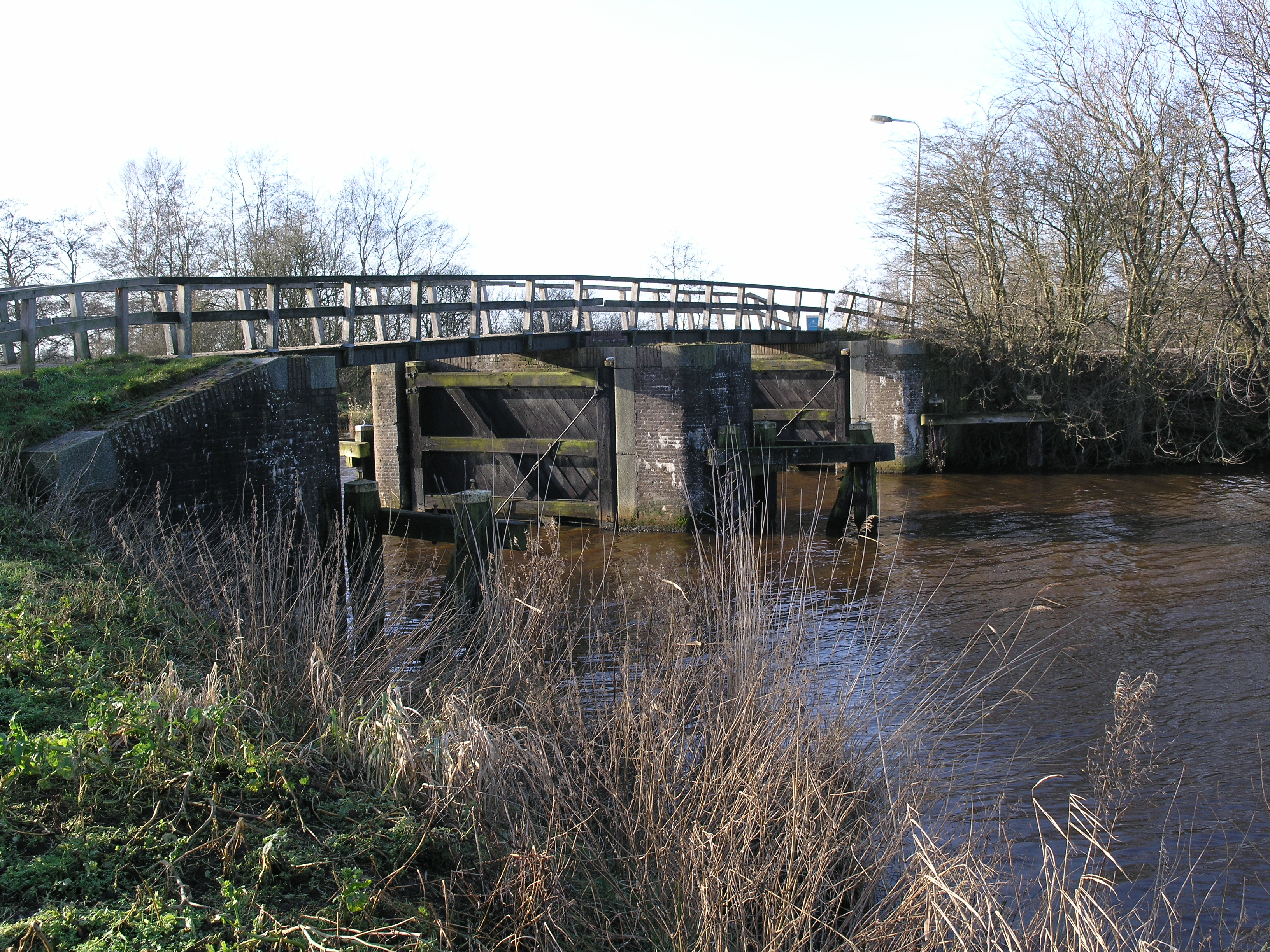 Blesdijke Lindesas